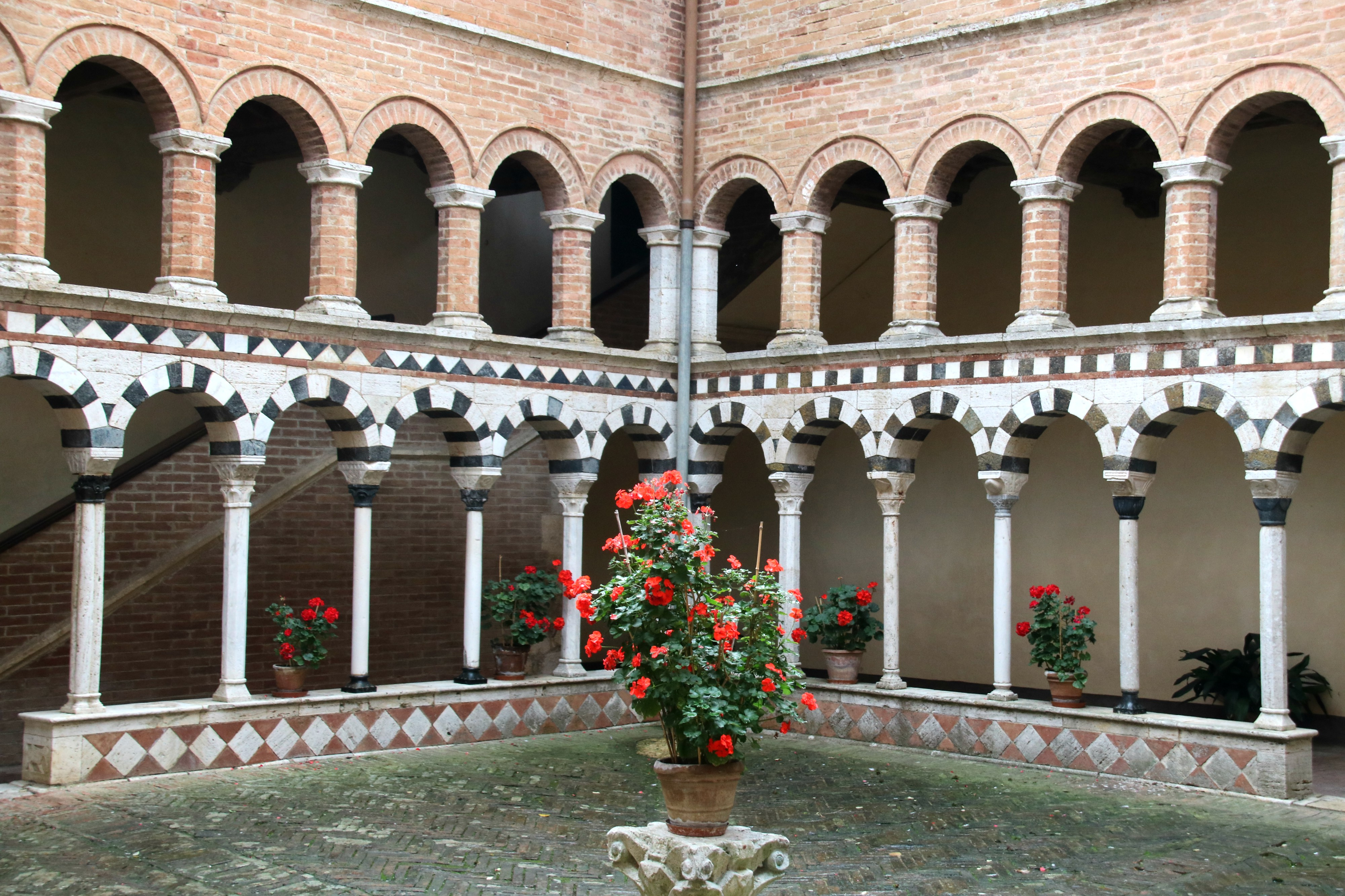 Chiostro della Pieve di Santa Mustiola (Torri)